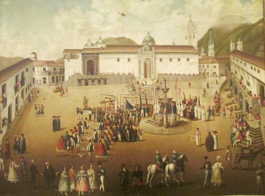 Plaza Mayor de la ciudad de Quito a finales del siglo XVIII